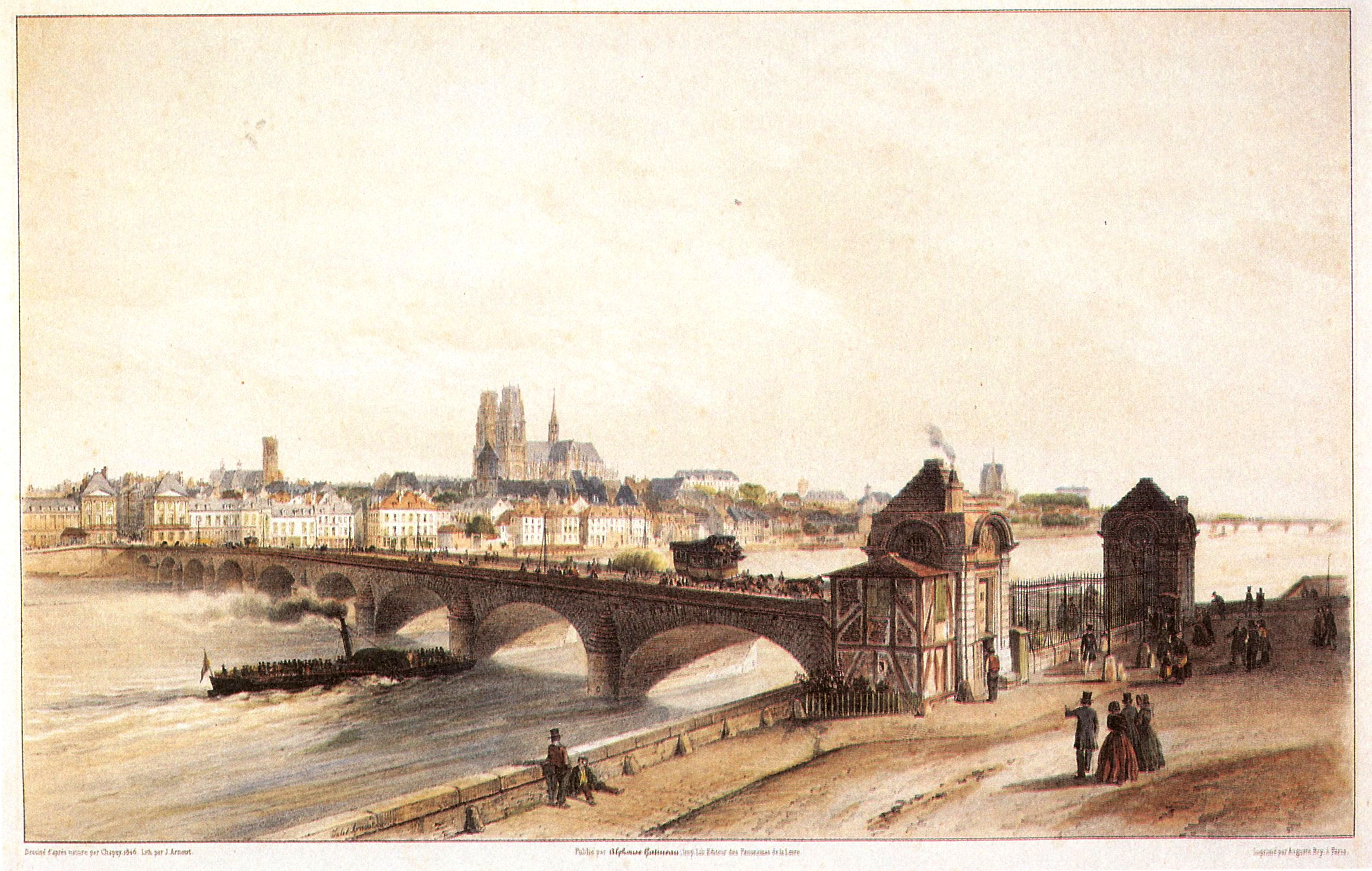 Pont Royal, vue aval, Orléans, Loiret, France